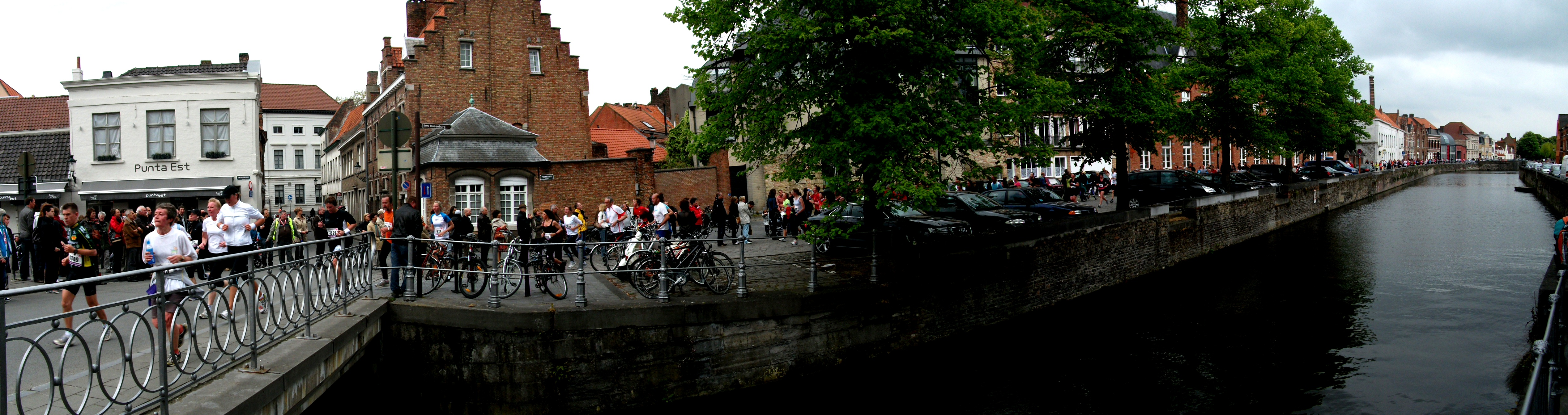 Een panoramische foto genomen tijdens de dertigste editie van 'Dwars door Brugge' op 9 mei 2010.